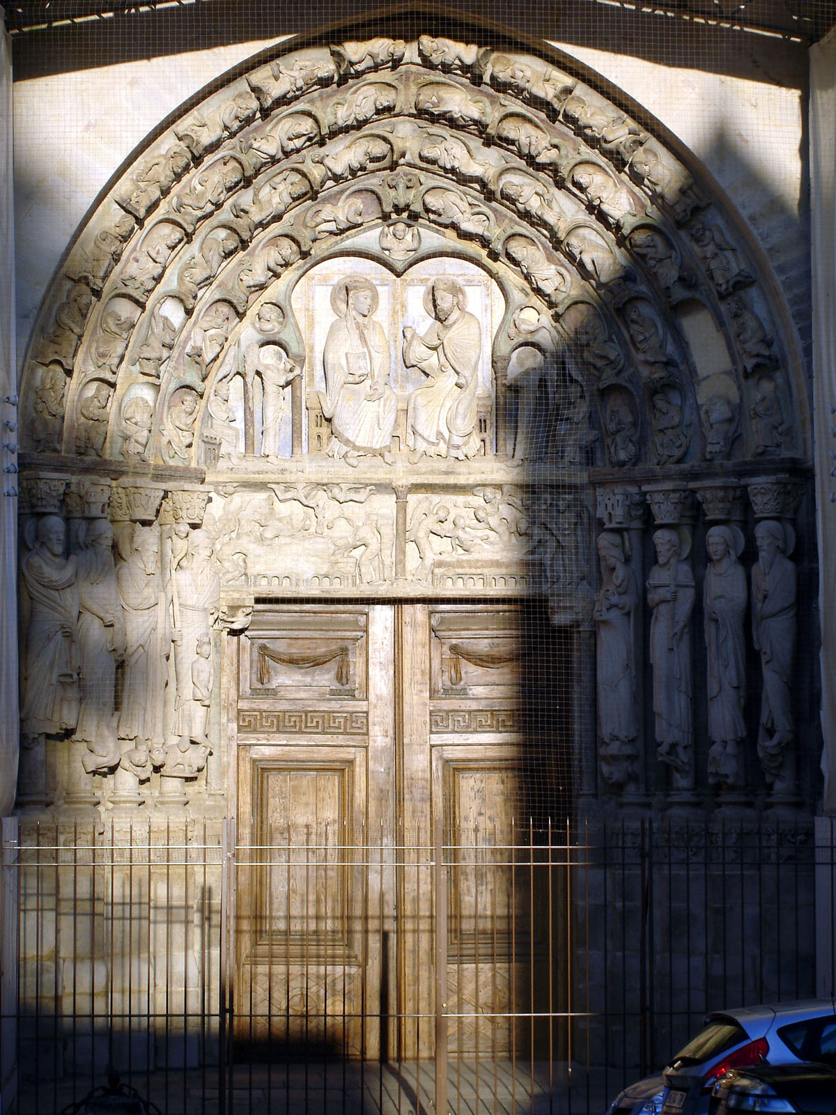 Le portail central de la cathédrale Notre-Dame de Senlis, Oise, France.